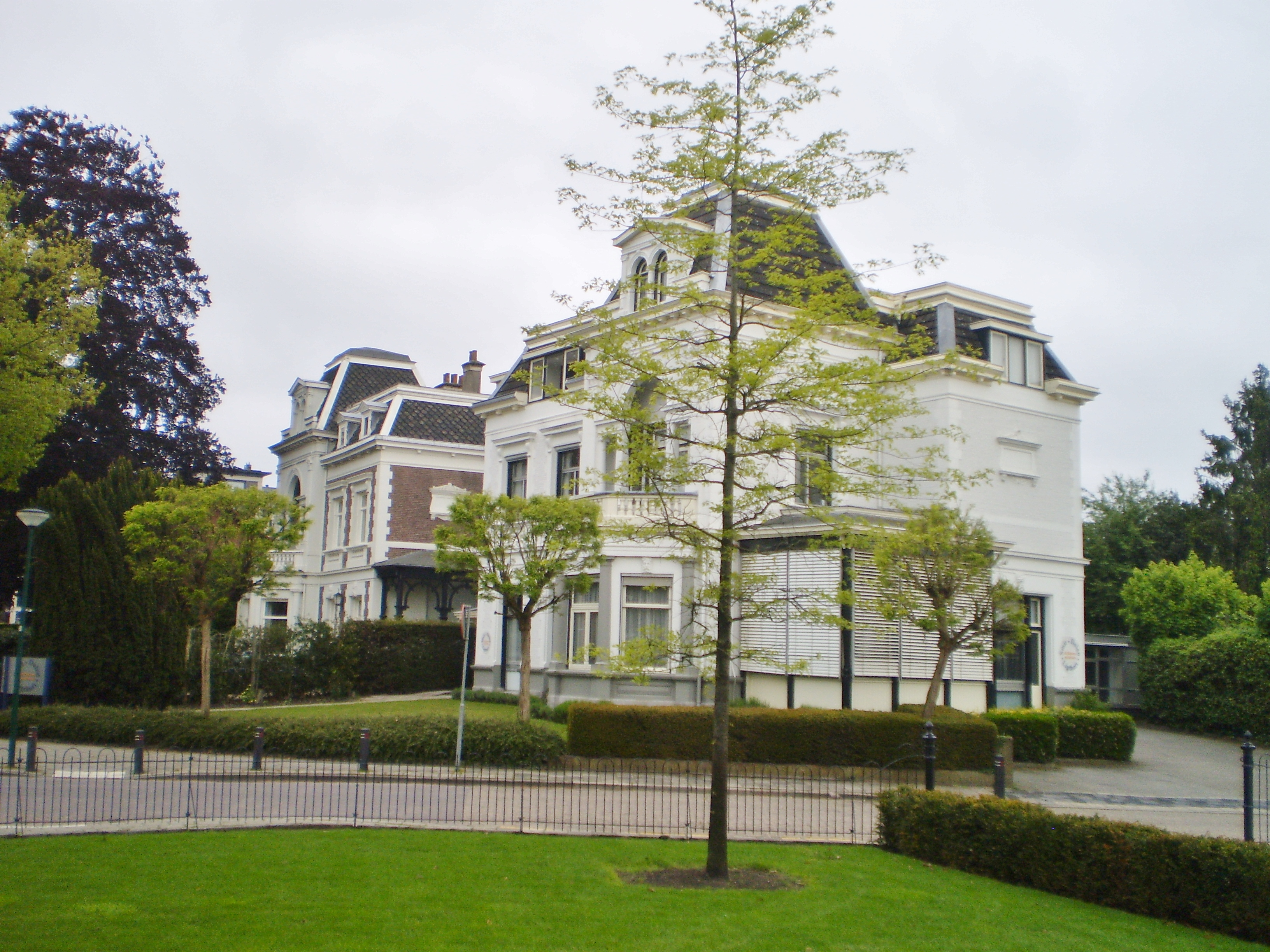 villa's Eemnesserweg 12 en 14 zijn elkkaar spiegelbeeld